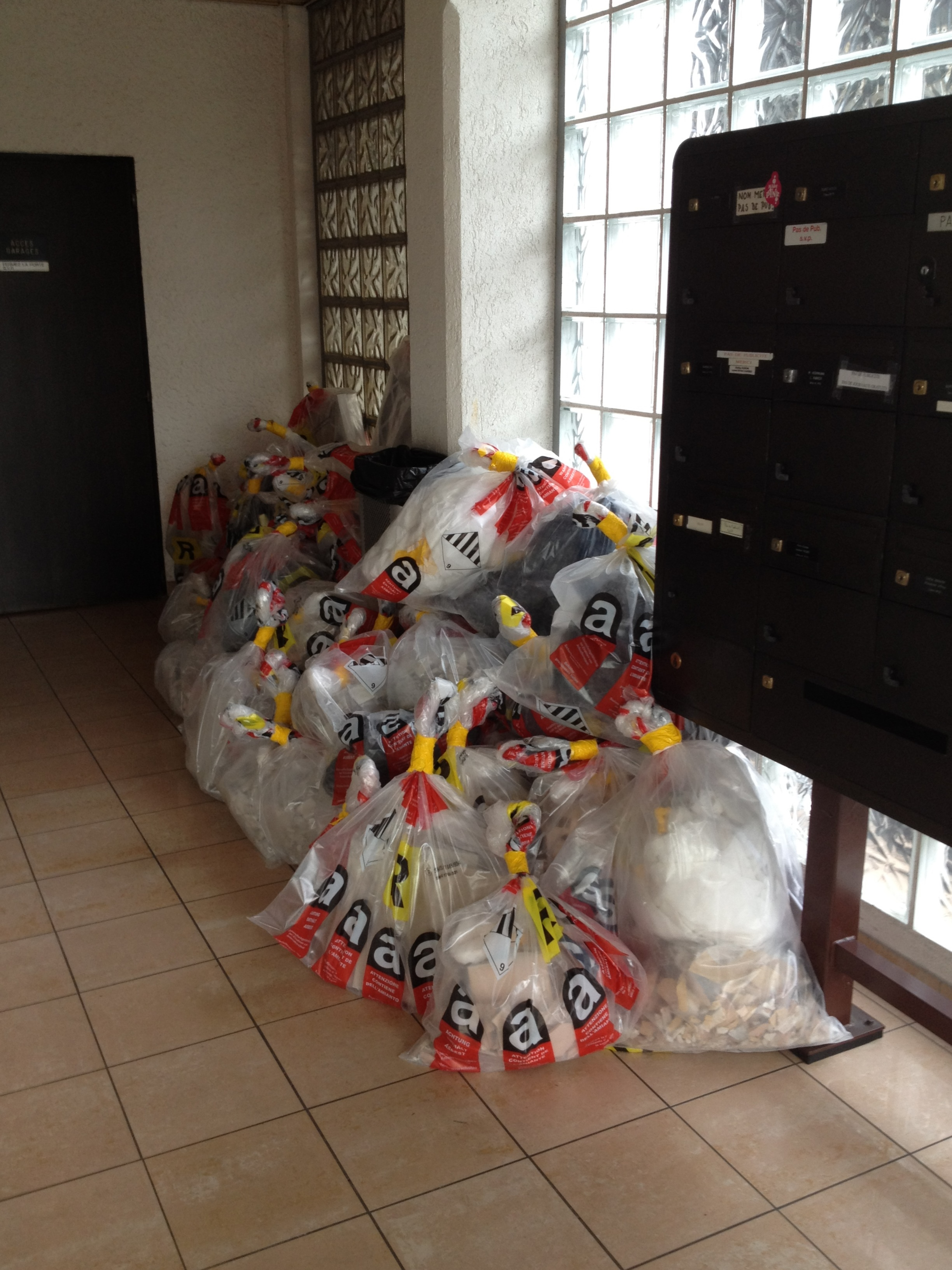 Opération de désamiantage (colle à catelles et crépis empaquetés selon procédure autorisée par le STEB) dans un immeuble à Genève